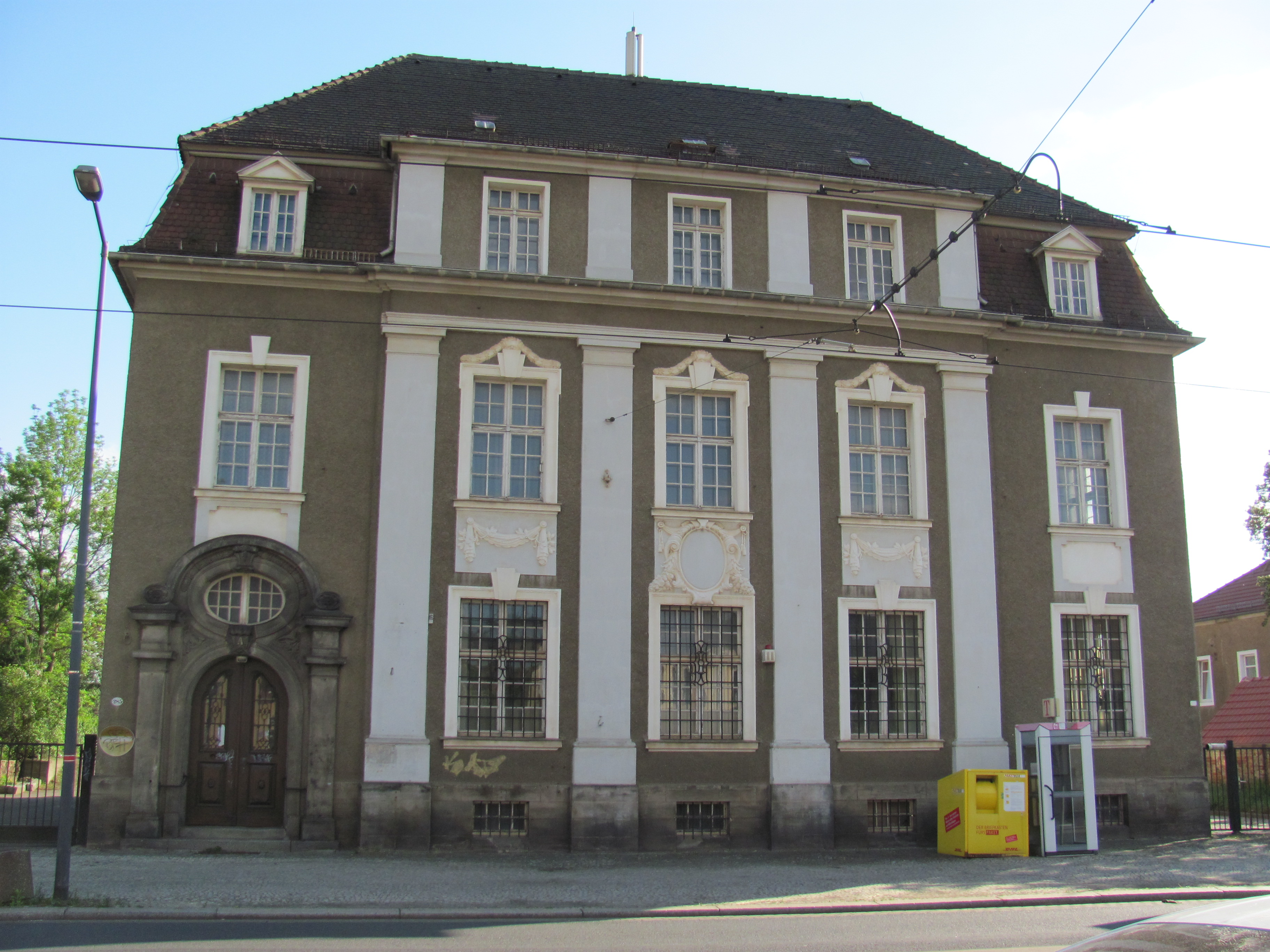 Radebeul Kötzschenbrodaer Postamt